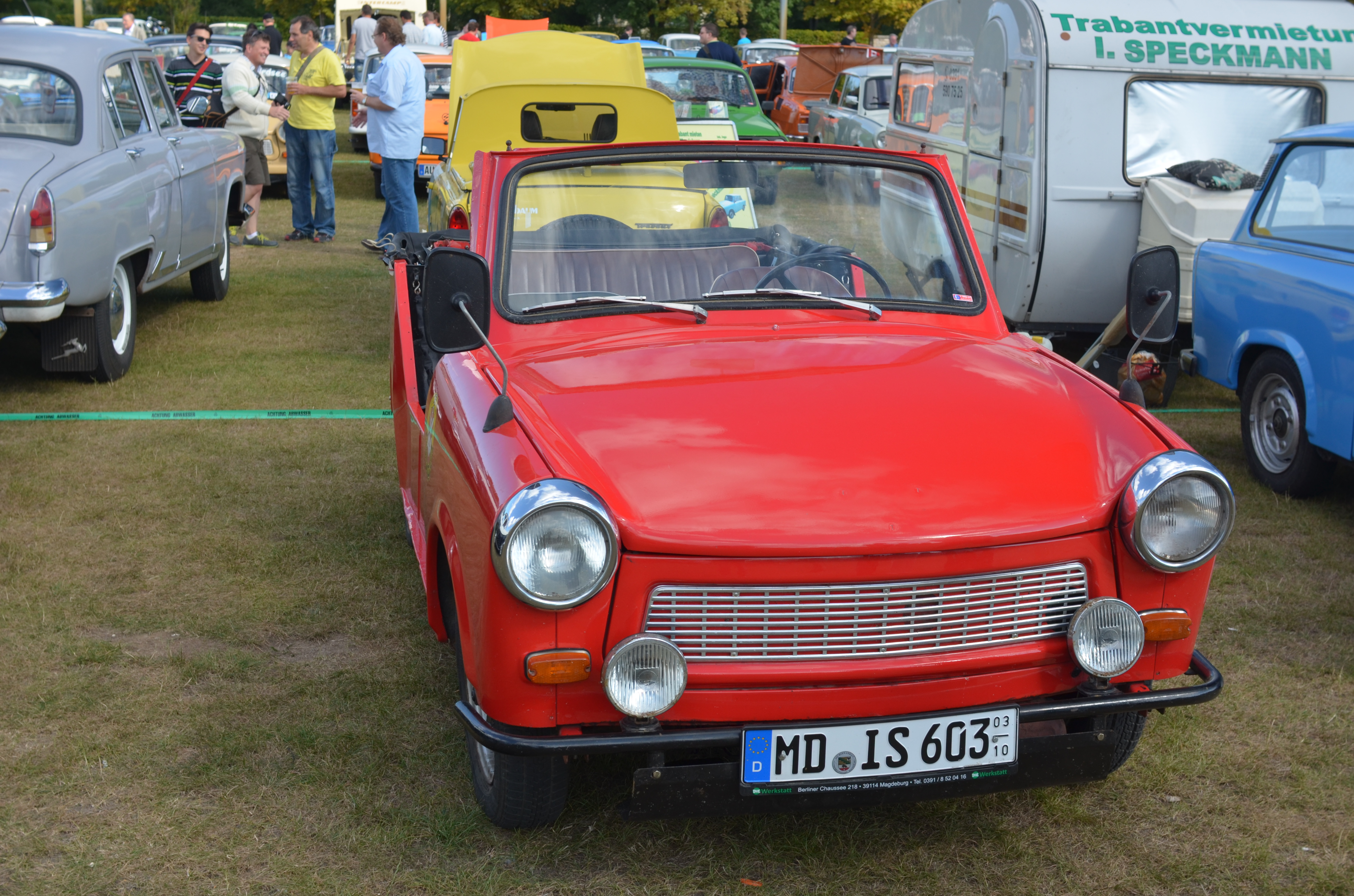 Trabant